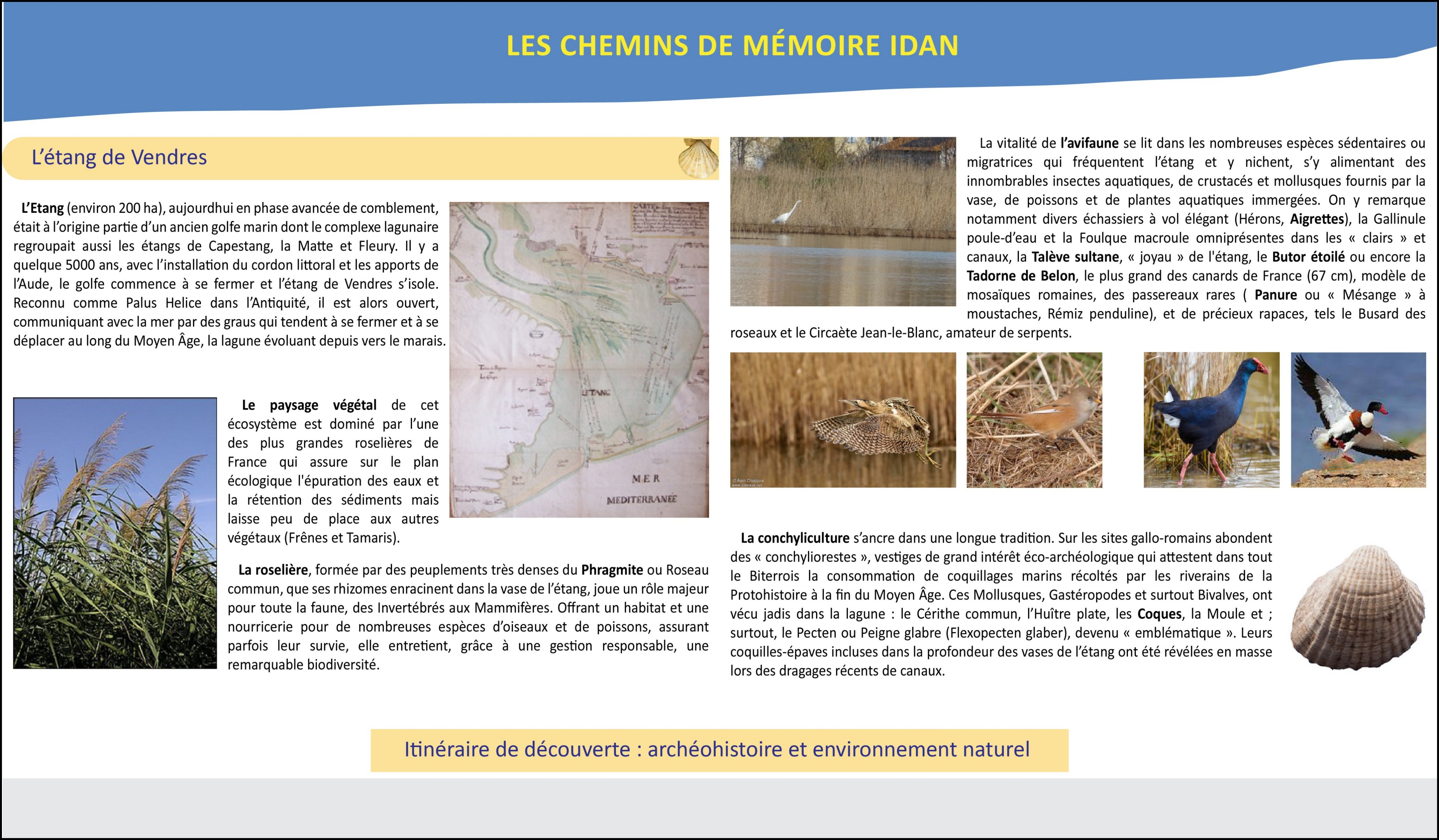 Vendres (Occitanie : Hérault) : l'étang, sa flore (phragmitaie ou roselière) et sa faune (Mollusques, Insectes, Poissons,Oiseaux surtout). Le pourtour de l'étang et les thermes romains de Vénus.